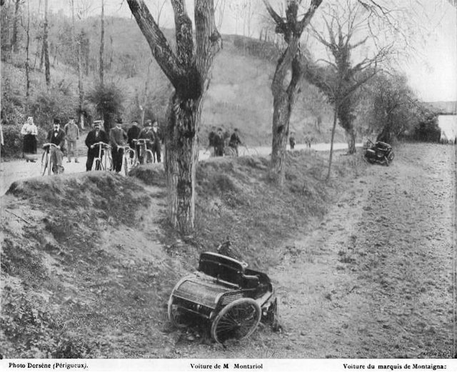 Photo de l'accident qui coûta la vie au marquis de Montaignac